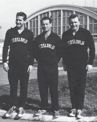 Marijan Žužej, Juraj Amšel and Zdravko Ježić in Bucharest